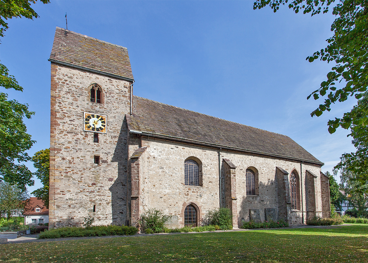 Evangelische Kirche in Langenholzhausen (Kalletal) This is the photograph of an architectural monument. It is part of the list of cultural monuments of Kalletal, no. 12